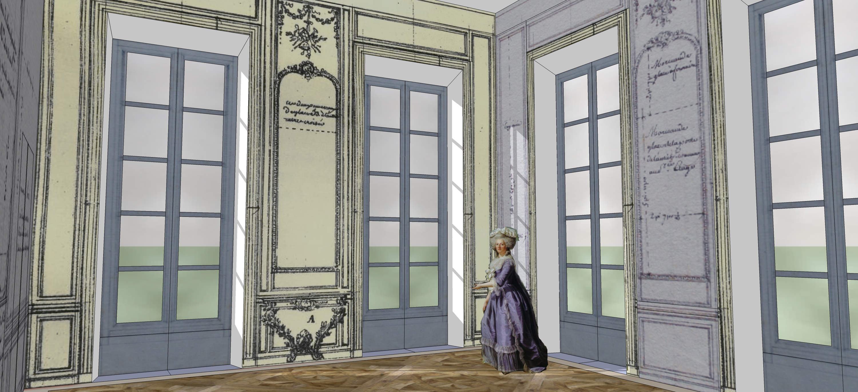 Schéma restituant le cabinet de Mme Adélaïde à Bellevue, vers 1774, avec les boiseries et glaces remployées.